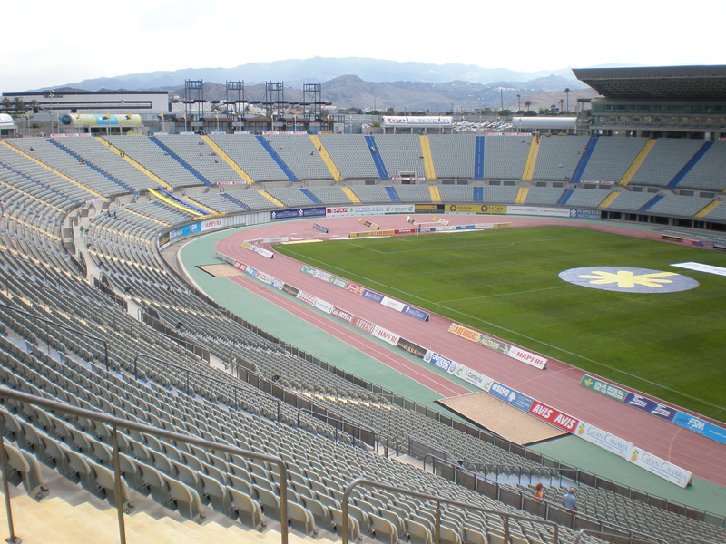 Vista del Estadio de Gran Canaria el 7 de septiembre de 2008.